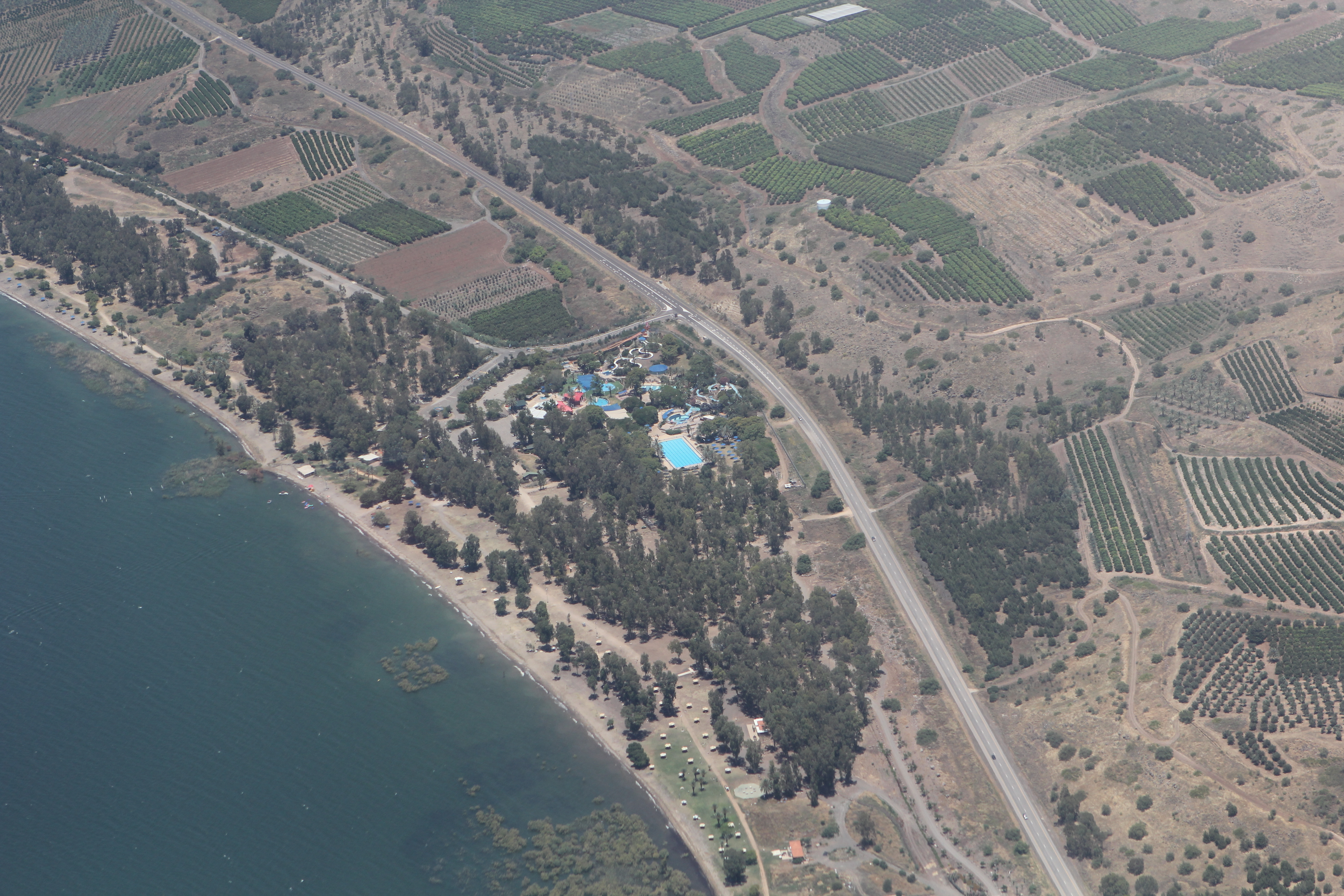 צילום אוויר של לונה גל